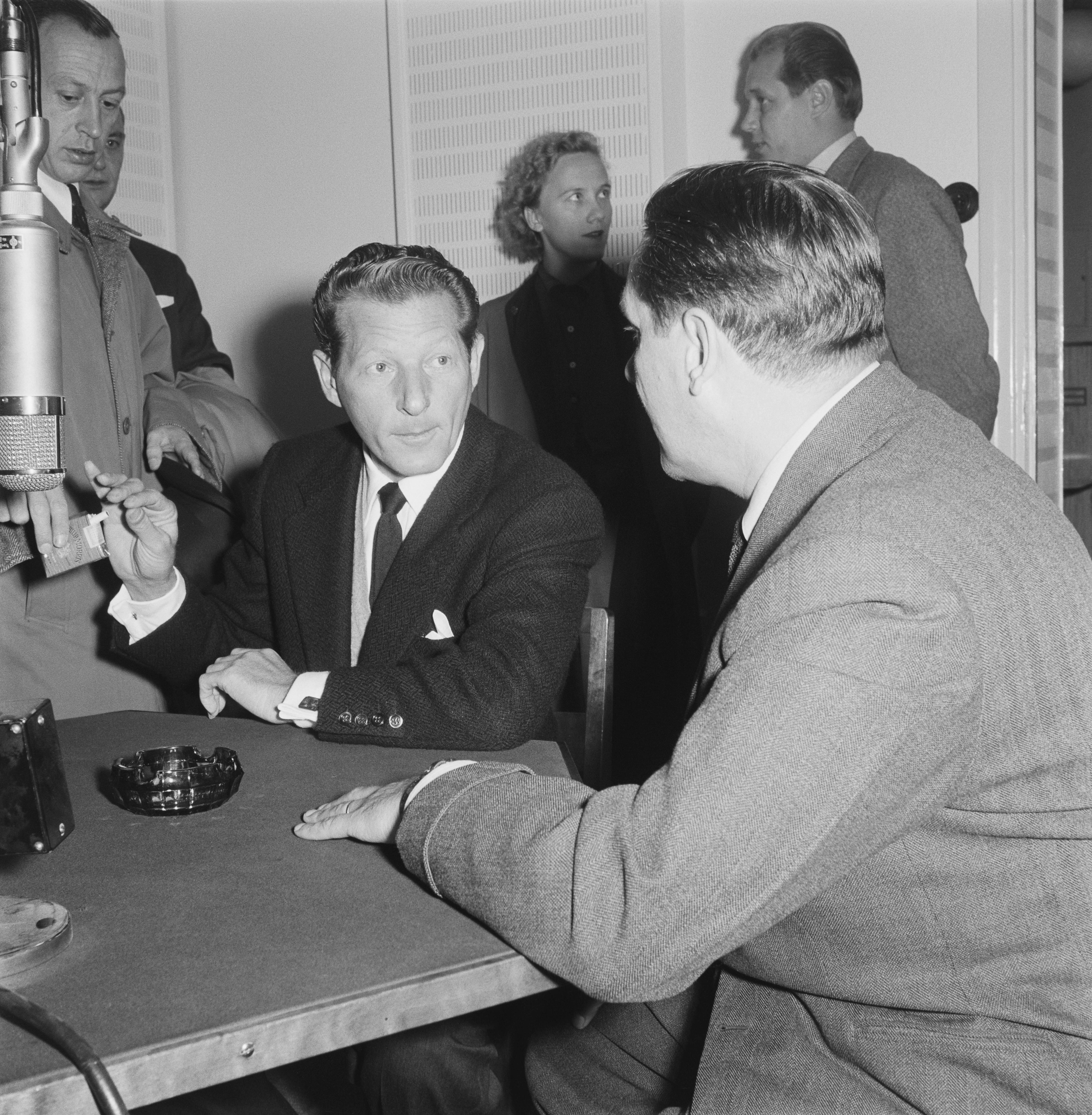 Yhdysvaltalainen näyttelijä Danny Kaye ja Yleisradion toimittaja Tauno Rautiainen studiossa. Vierasta haastatellaan radion Päivän peili -ohjelmaan. Tiedätkö jotain tästä kuvasta? Jätä kommentti tai ota yhteyttä sähköpostitse: Tutustu Ylen arkistosisältöihin: Fler skatter från Yles arkiv: More about Yle, the Finnish Broadcasting Company